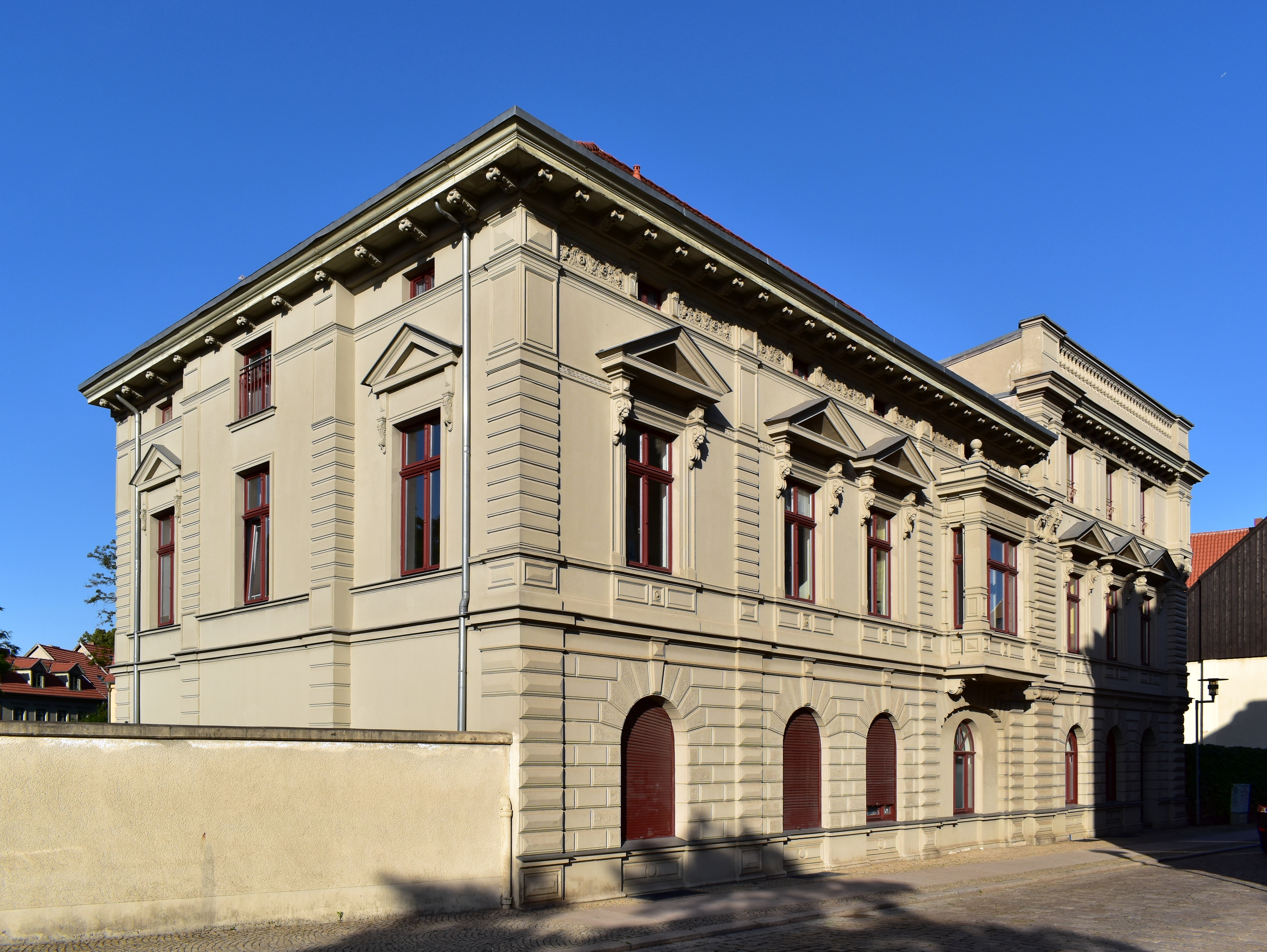 Gebäude Hohe Straße 9-10 in Aschersleben